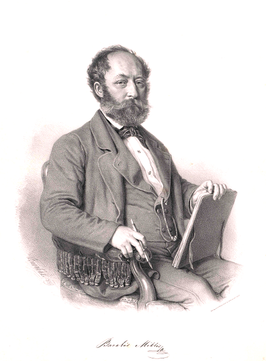 Barabás Miklós (Márkusfalva, 1810. február 10. – Budapest, 1898. február 12.) magyar festő. A magyar biedermeier festészet egyik legkiválóbb mestere, a Magyar Tudományos Akadémia levelező tagja.